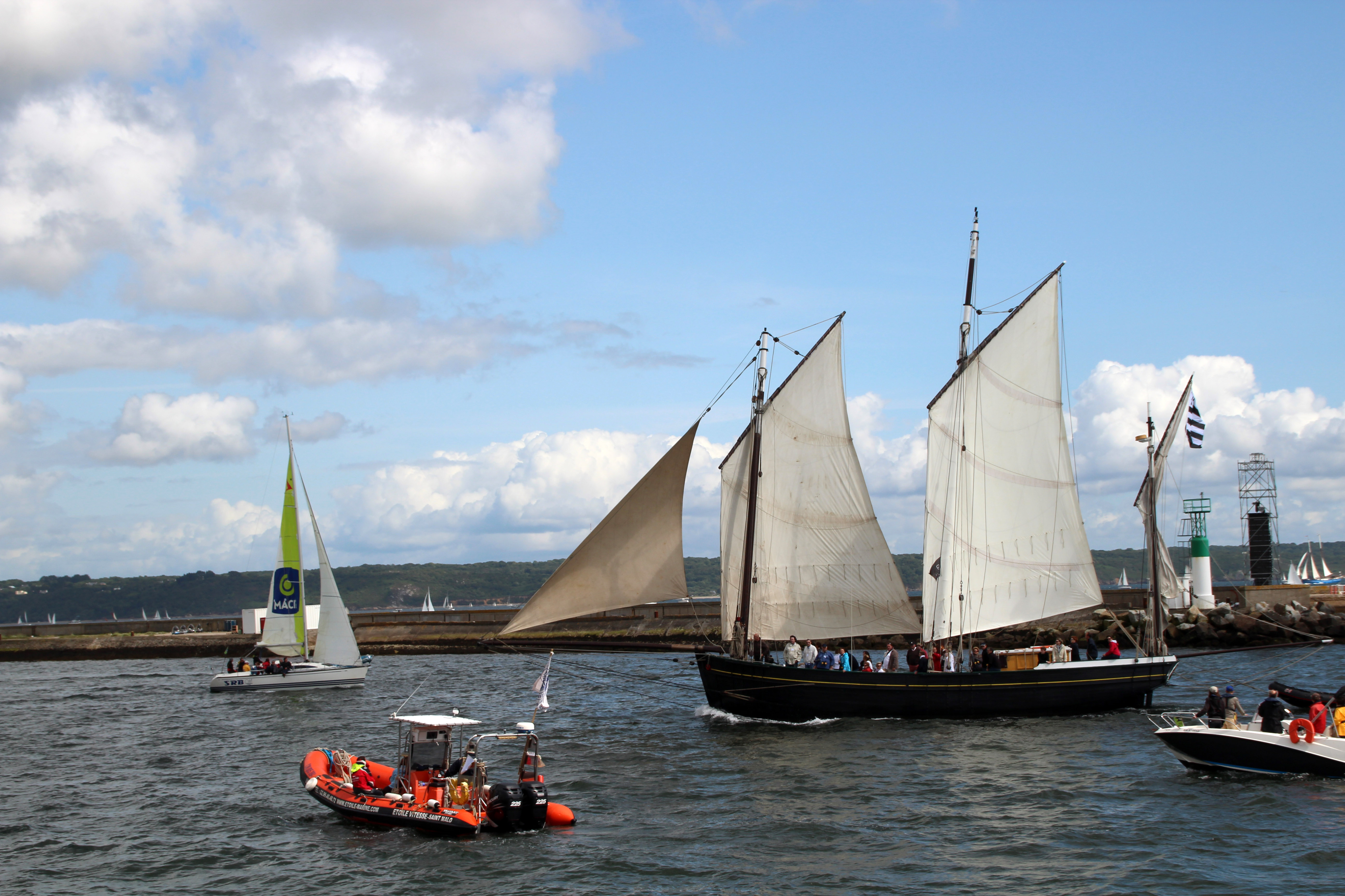 Tonnerres de Brest 2012- Corentin en rade abri